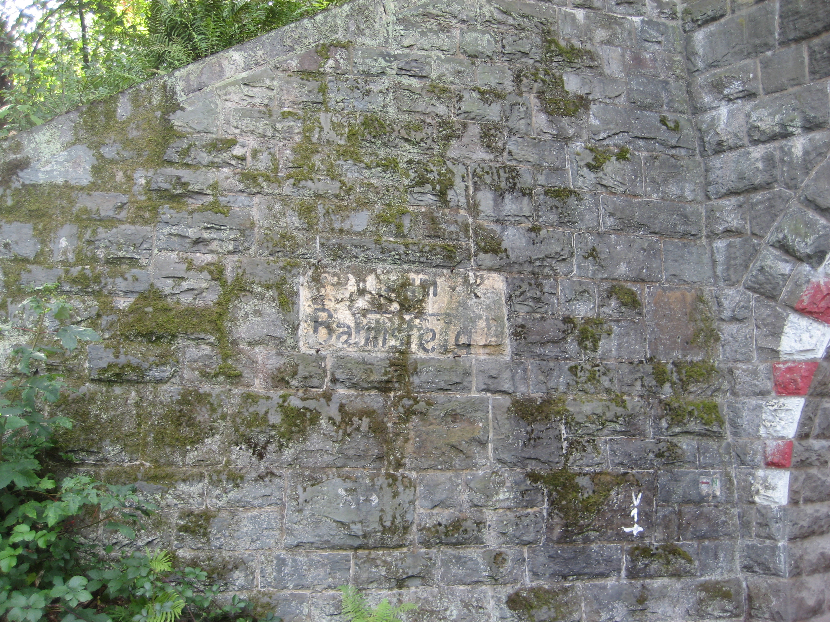 Alte Beschriftung „Zum Bahnsteig“ (ehem. Bf. Wengern West der Elbschetalbahn) am Straßentunnel (Unterführung) Ecke Mühlenweg/Wengerner Mühle, Wetter-Wengern